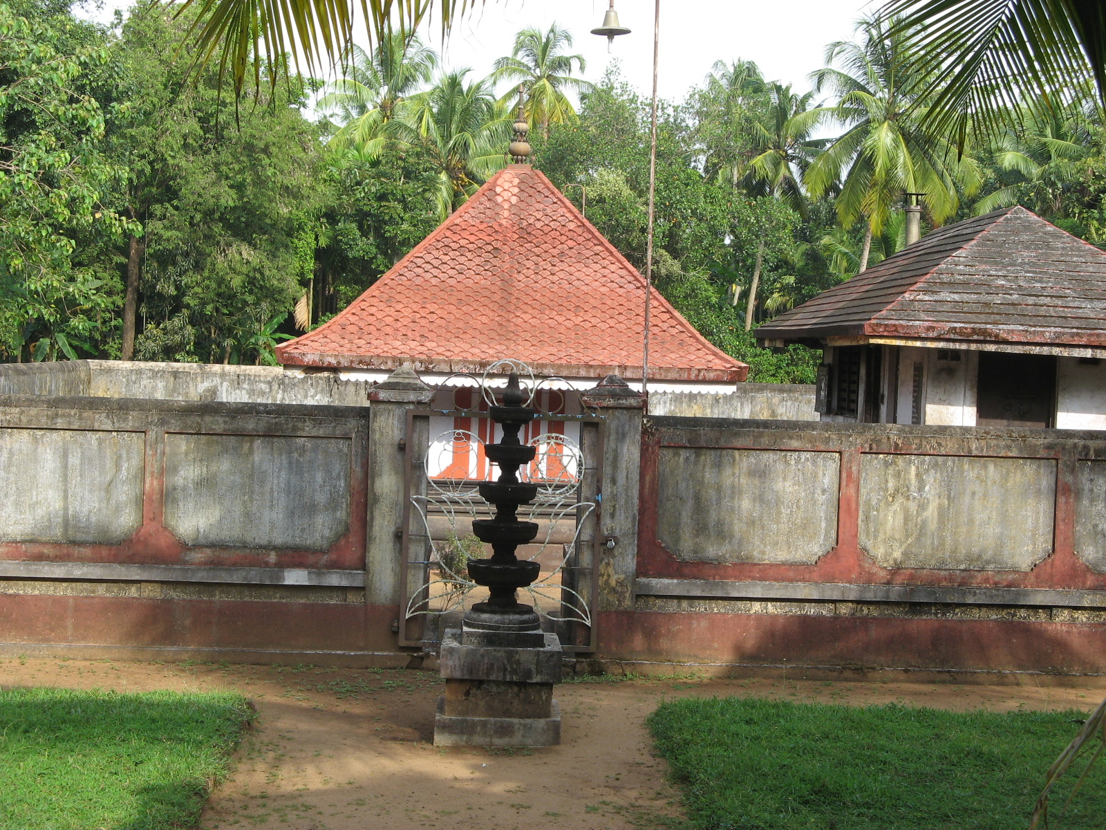 കുഴൂർ നാരായണൻ‌കുളങ്ങര ക്ഷേത്രം